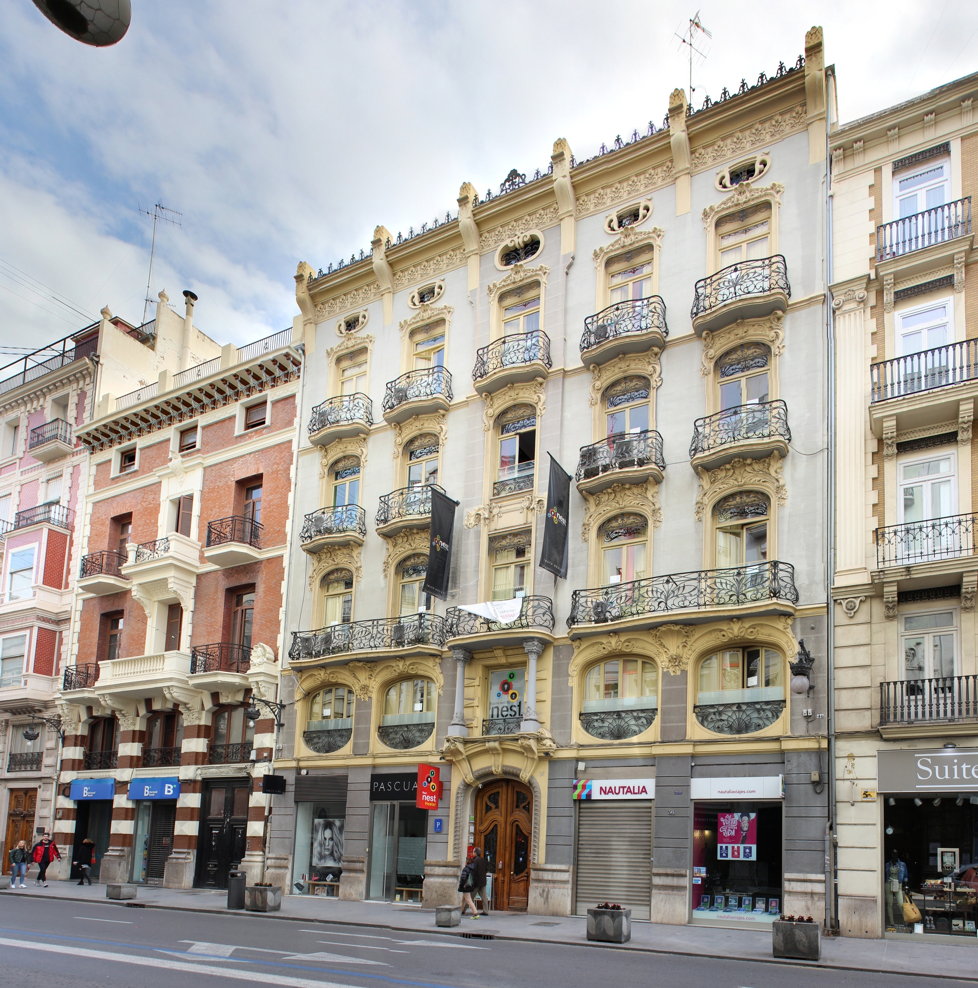 Edificio Ángeles Grau de Peregrín Mustieles Cano (1905) en Valencia